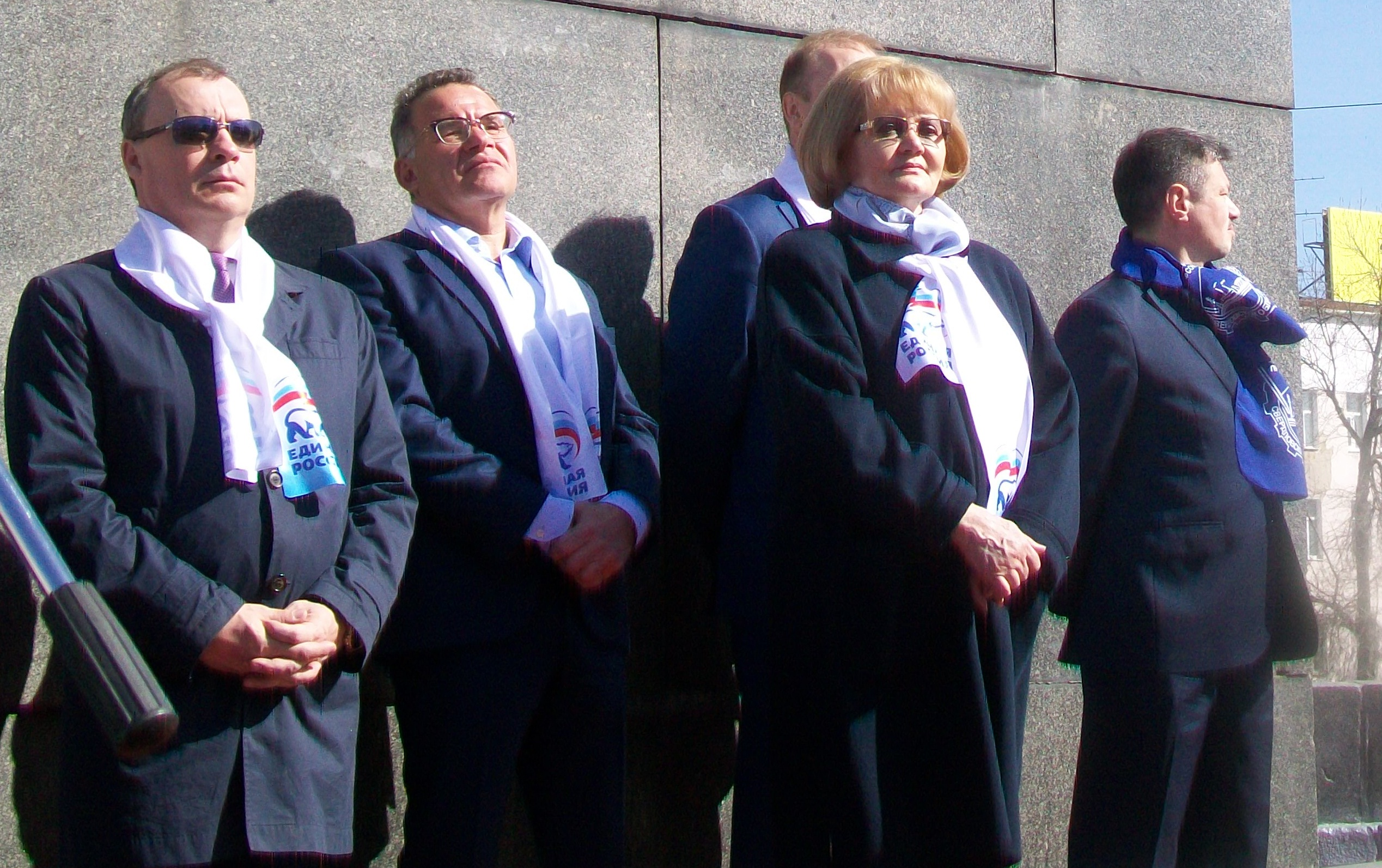 Председатель Федерации профсоюзов Свердловской области Андрей Леонидович Ветлужских(крайний справа) и свердловские единороссы на митинге 1 мая 2017 года в Екатеринбурге